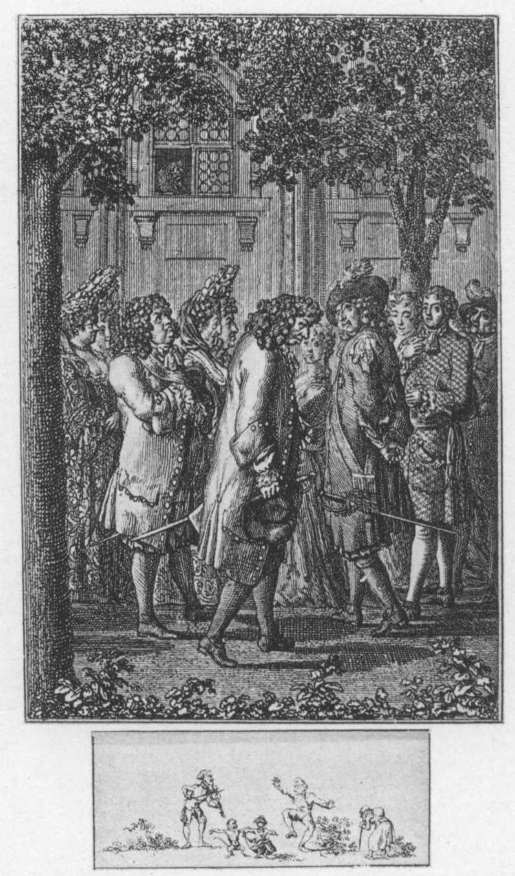 Titelkupfer zu: „Scarron am Fenster“ von Kretschmann. Scarron sitzt oben am Fenster eines Hauses und betrachtet spottend das Gewühl der Menschen in den Tuillerien; (einen Buchhändler, einen reichen Pächter, einen filzigen Millionär etc.) (Beigabe zum Almanach und Taschenbuch zum geselligen Vergnügen von W. G. Becker für 1798.) (Beschreibung lt. Quelle)